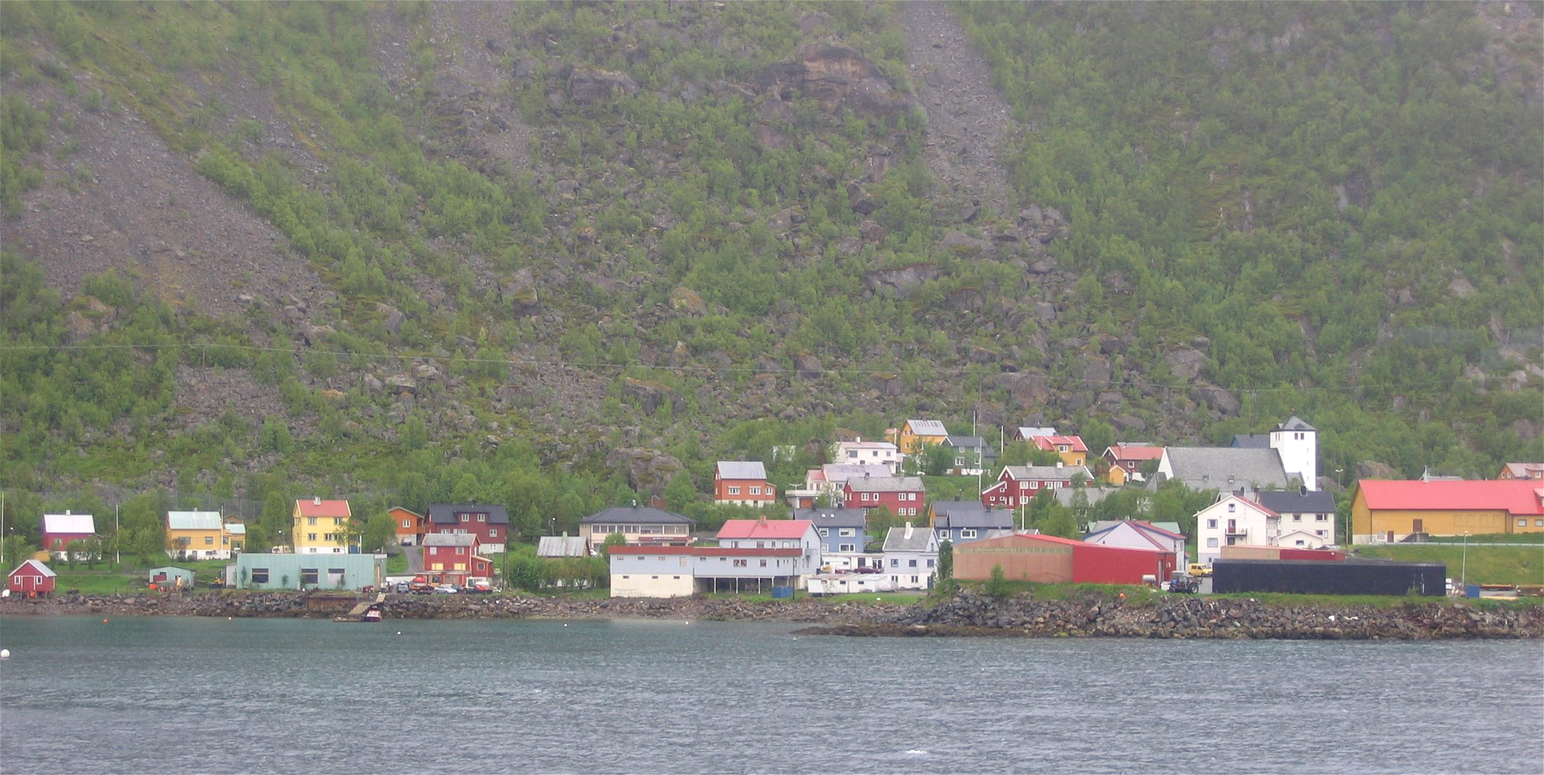 Øksfjord, Norwegen